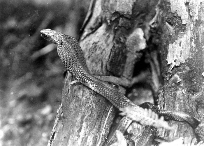 Repronegatief. Gifslang 'Naja tripudianus sputatrix